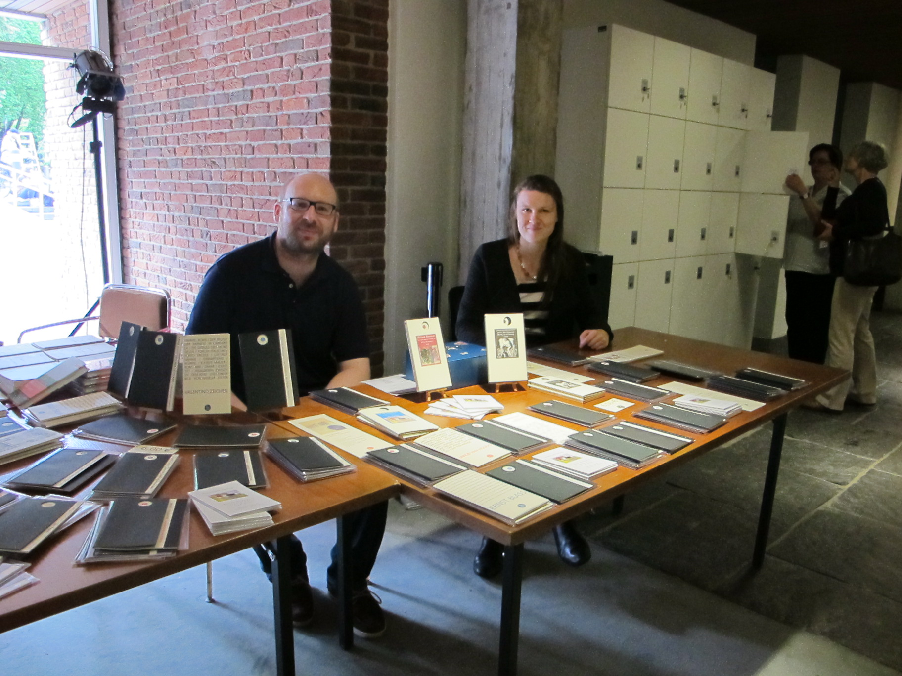 Lyrikmarkt Poesiefestival Berlin 2014